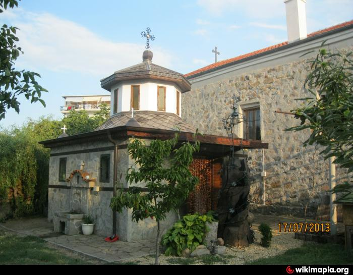 Параклис " Свети Пантелеймон Лечител " в двора на храм Свети Никола "